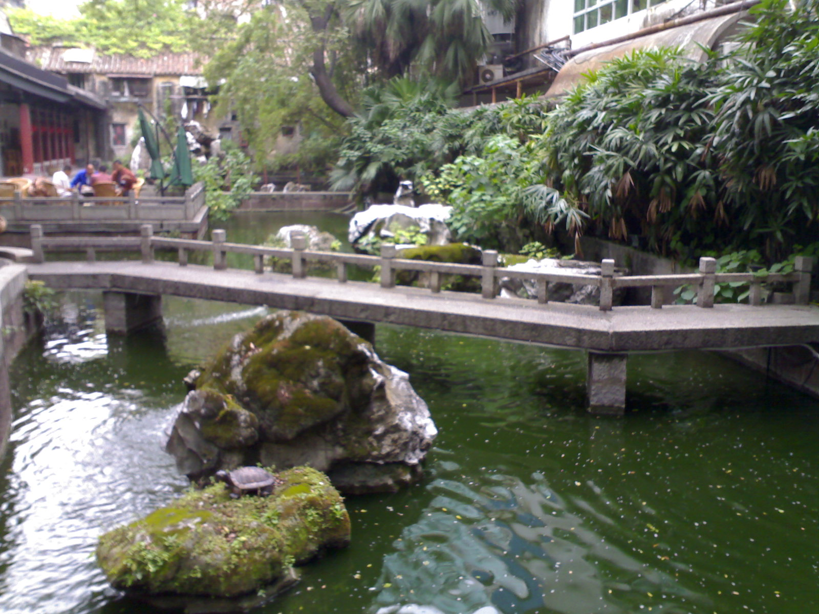 中国广州药洲遗址的园内景色